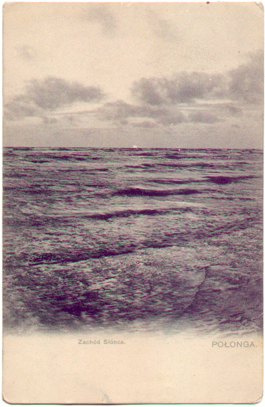 Saulėlydis Palangoje. 1904 m.